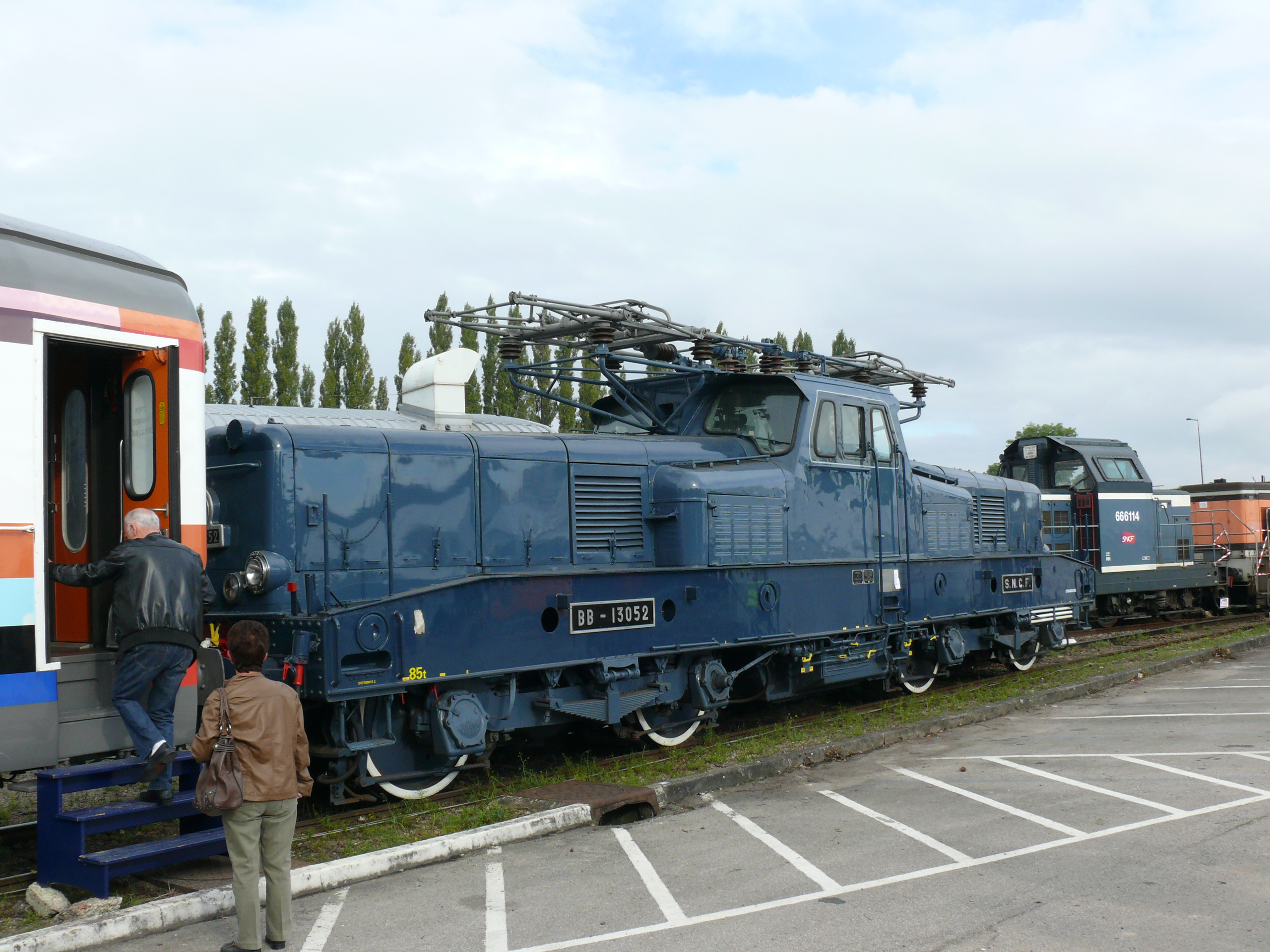 Journées portes ouvertes au dépôt de Longueau de 5 et 6 octobre 2013 :Locomotive BB 13052